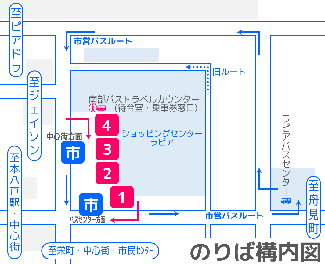 ラピアバス乗り場位置略図